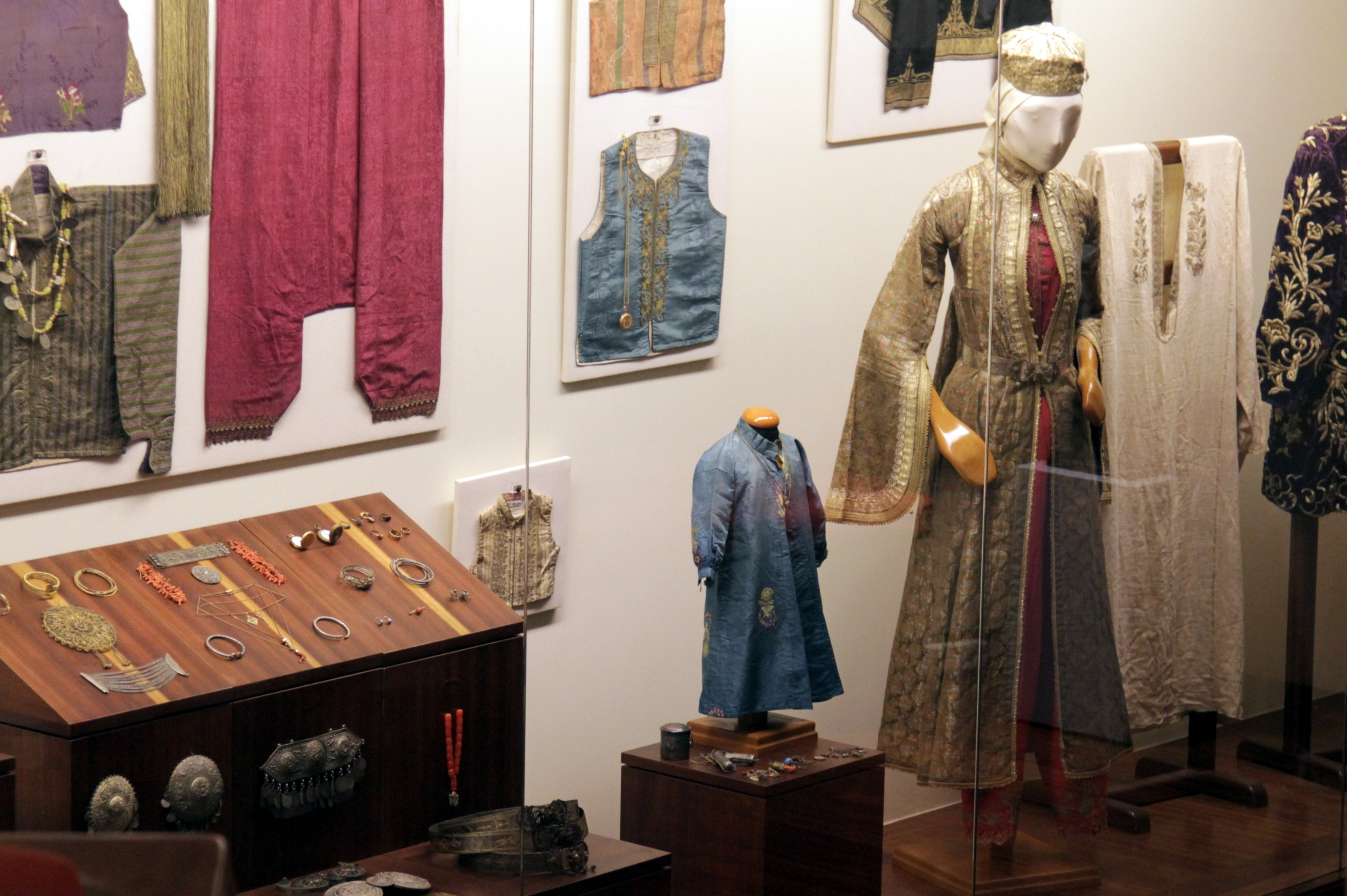 Το Εβραϊκό Μουσείο της Ελλάδος. (Αθήνα).